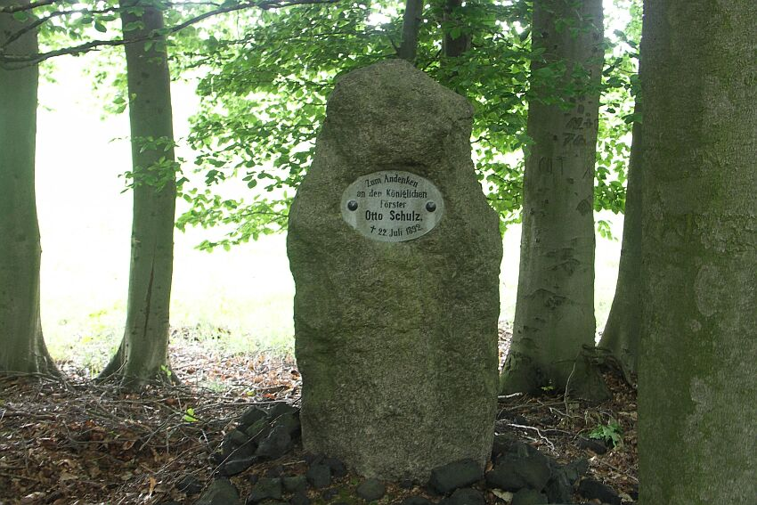 memorial stone for Otto Schulz, forester in Landkreis Oder-Spree, Germany